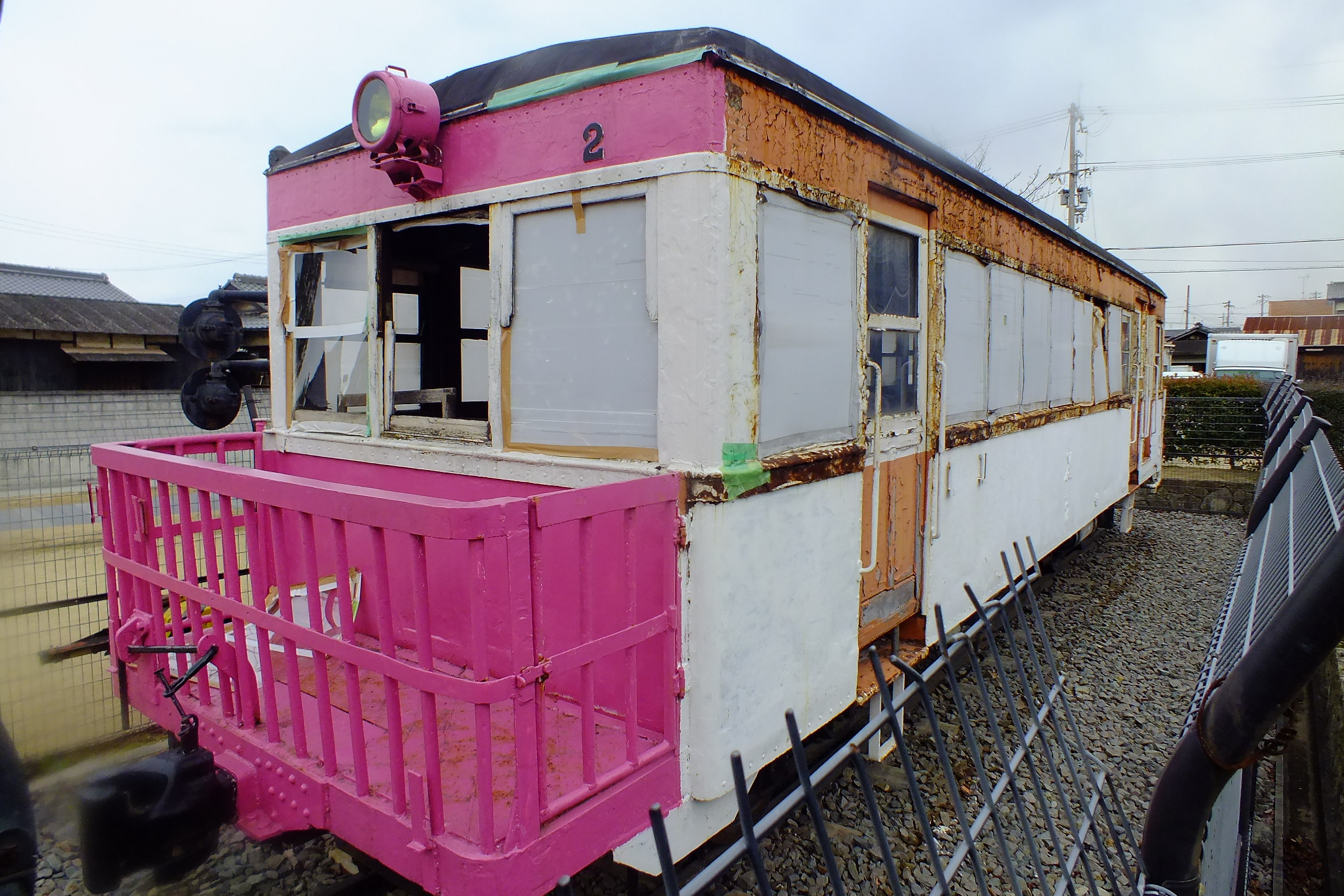 別府鉄道 キハ2気動車 野口線で使用。1931年製造、1965年入線。小型の車両で、円長寺広場に保存。